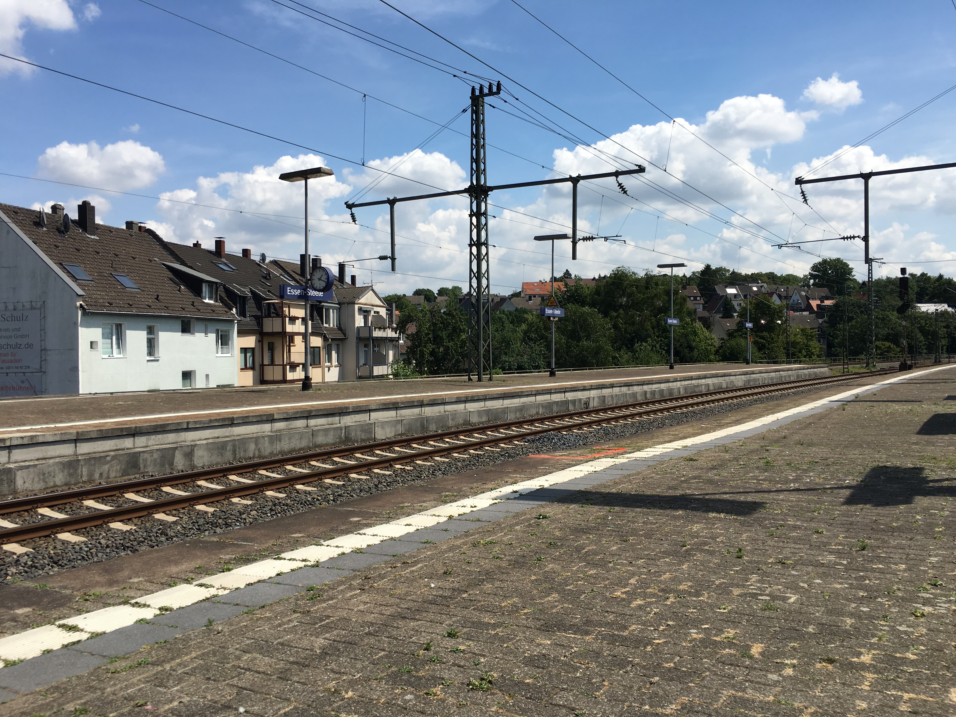 Der S-Bahnhof im Essener Stadtteil Steele